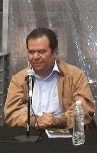 David Ricardo en la presentación del libro Oro verde y Otras obras, Museo del Estanquillo, CDMX, 2014.